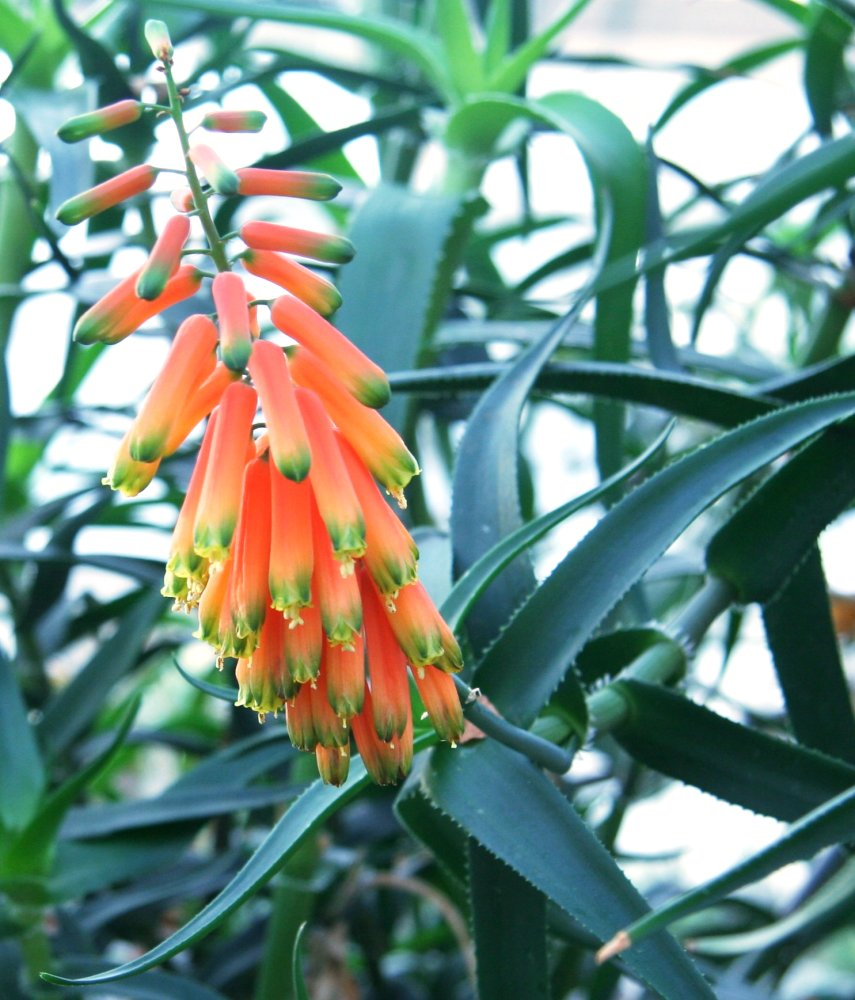 Aloe ciliaris Blüte